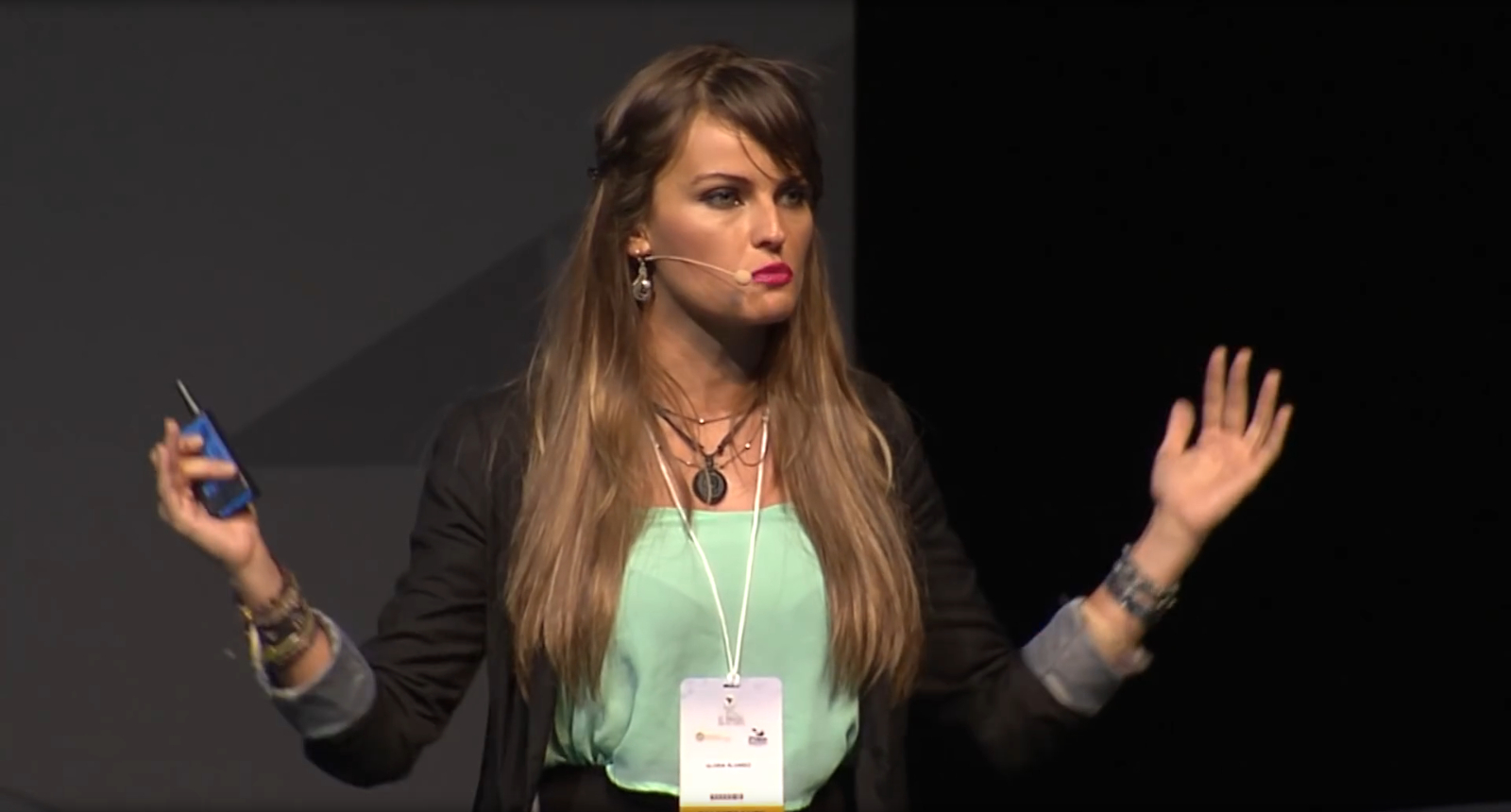 Gloria Álvarez en el 2º Fórum Liberdade e Democracia SP, 19 de octubre de 2015.